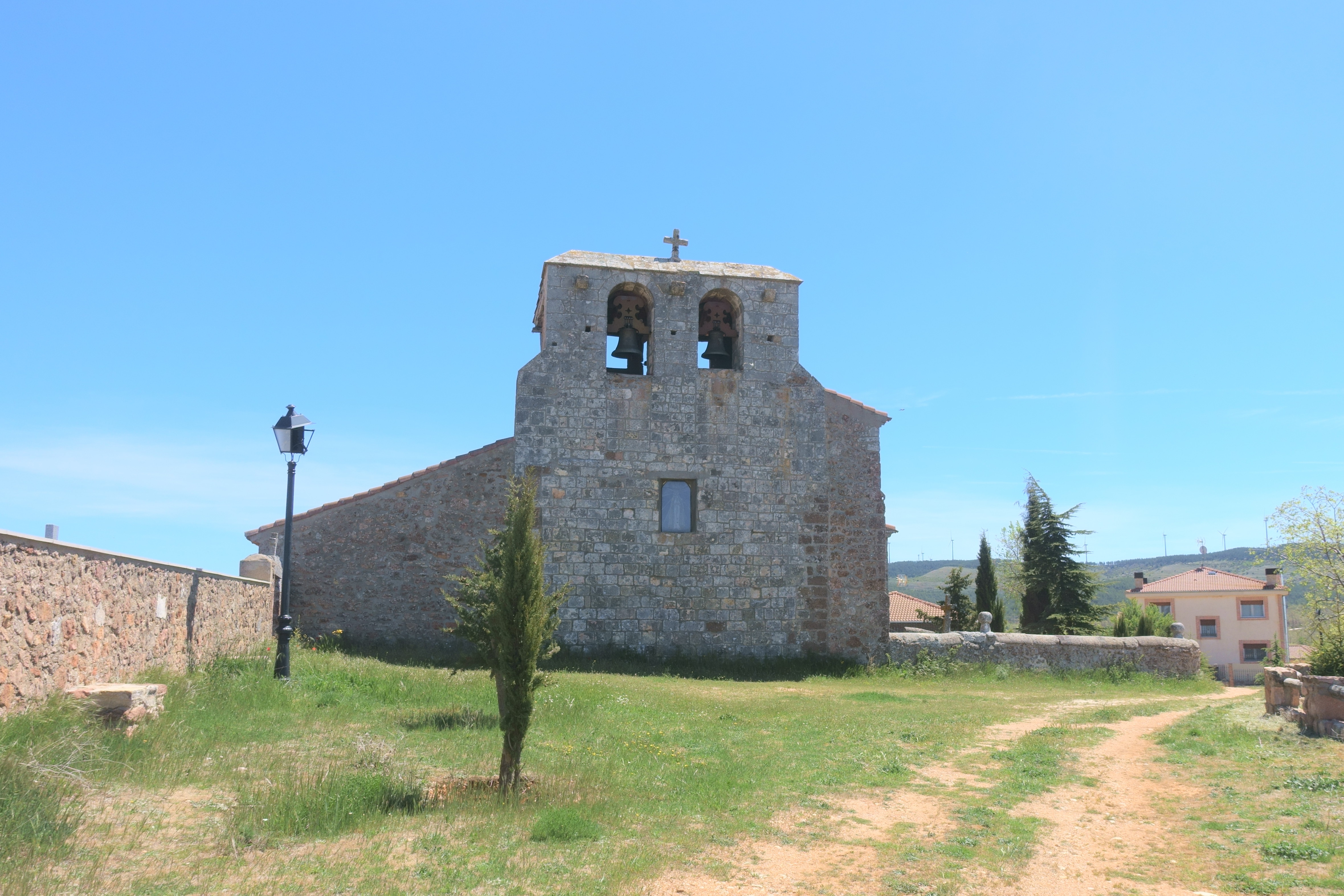 Iglesia de la Visitación, Aldeanueva de la Serrezuela (Segovia, España).